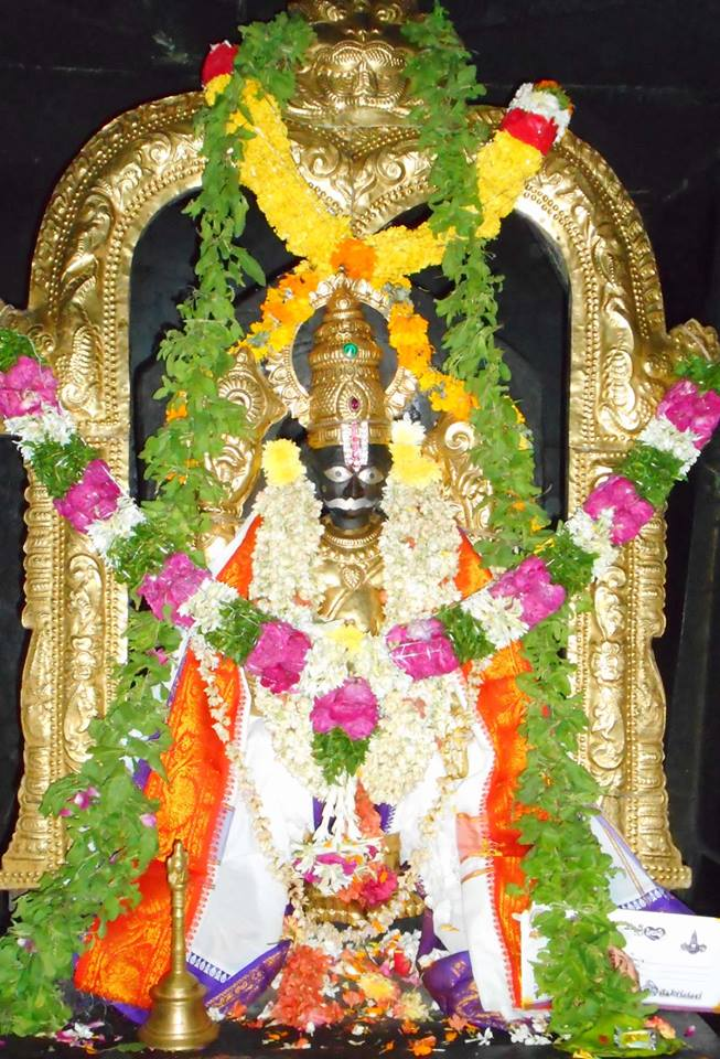 వెలుగొండ వేంకటేశ్వర స్వామి క్షేత్రం శ్రీలక్ష్మీ అలివేలుమంగ సమేత శ్రీవెలుగొండ వేంకటేశ్వర స్వామి క్షేత్రం ప్రకాశం జిల్లా కొనకనమిట్ల మండలం గార్లదిన్నె పంచాయతీలో ఉంది. ఈ క్షేత్రం కంభం అటవీ ప్రాంతంలో కలదు. ఆలయానికి చేరుకోవడానికి రెండు మార్గాలున్నాయి. ఒకటో మార్గం.. 566 నంబర్‌ జాతీయ రహదారి నుంచి కేవలం ఐదు కిలోమీటర్ల దూరంలో ఉంటుంది. మార్కాపురం నుంచిగానీ, కొనకనమిట్ల నుంచి గానీ వస్తున్నప్పుడు నాగిరెడ్డిపల్లె గ్రామం వస్తుంది. అక్కడి నుంచి ఆలయానికి రోడ్డు మార్గం కలదు. నాగిరెడ్డిపల్లె గ్రామం నుంచి శ్రీవెలుగొండ వేంకటేశ్వర స్వామి క్షేత్రానికి ఐదు కిలోమీటర్లు ఉంటుంది. మార్కాపురం నుంచి వెలుగొండ క్షేత్రానికి 28 కిలో మీటర్లు ఉంటుంది. కొనకనమిట్ల నుంచి 16 కిలో మీటర్లు ఉంటుంది. రెండో మార్గం.. ఒంగోలు – కర్నూలు రహదారి నంబర్‌ 53 నుంచి కూడా ఈ పుణ్యక్షేత్రానికి రావొచ్చు. గొట్లగట్టు వద్ద నుంచి నాగిరెడ్డిపల్లె వెళ్లే పీఎస్‌ఆర్‌ మార్గం నుంచి వెలుగొండ క్షేత్రానికి చేరుకోవచ్చు. గొట్లగట్టు నుంచి 13 కిలో మీటర్లుంటుంది.